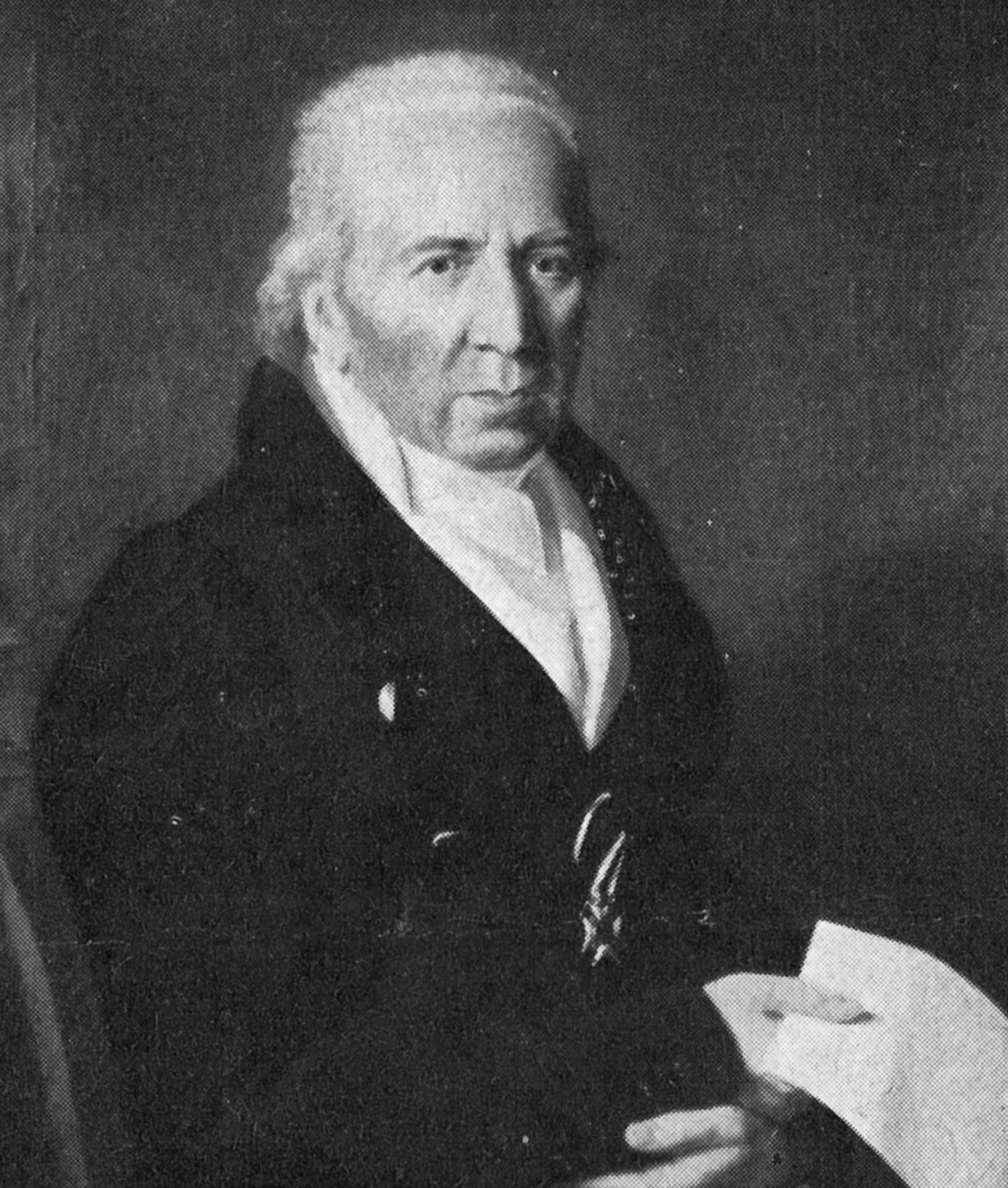 Der Oberfinanzrat Rudolph Ferdinand von Feuerlein (* 1744; † 1821) war seit 1806 Königlich Württembergischer Oberfinanzrat und seit 1814 Ritter des Zivilverdienstordens, womit der persönliche Adel verbunden war. In seinem Testament vom 27. November 1815 hat Rudolf Ferdinand von Feuerlein die Errichtung der Familienstiftung Feuerlein verfügt